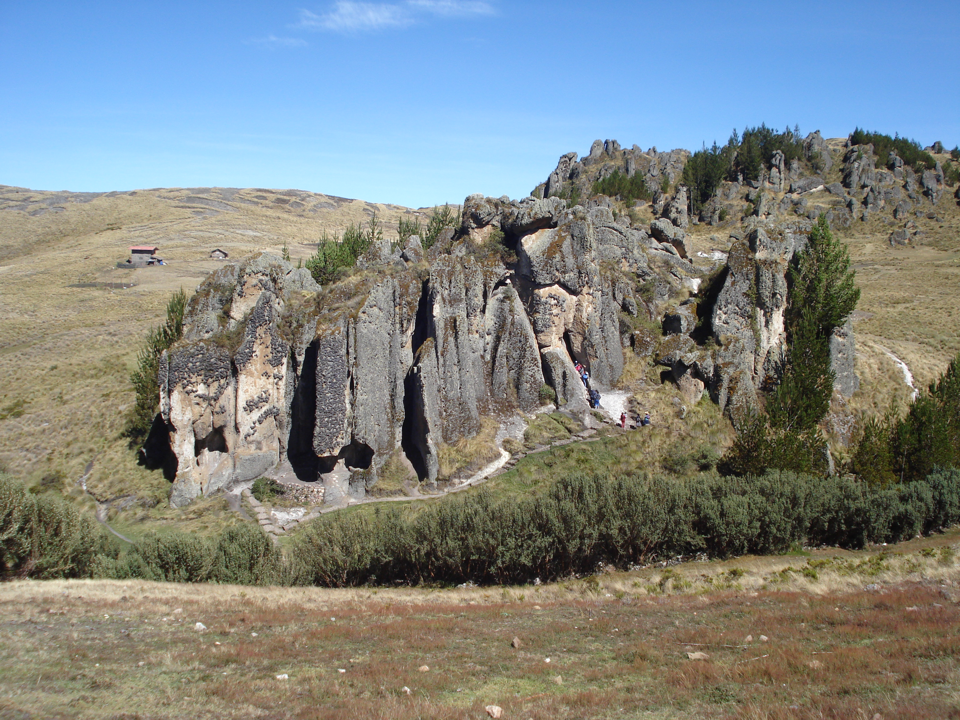 Vista inicial de Cumbemayo.